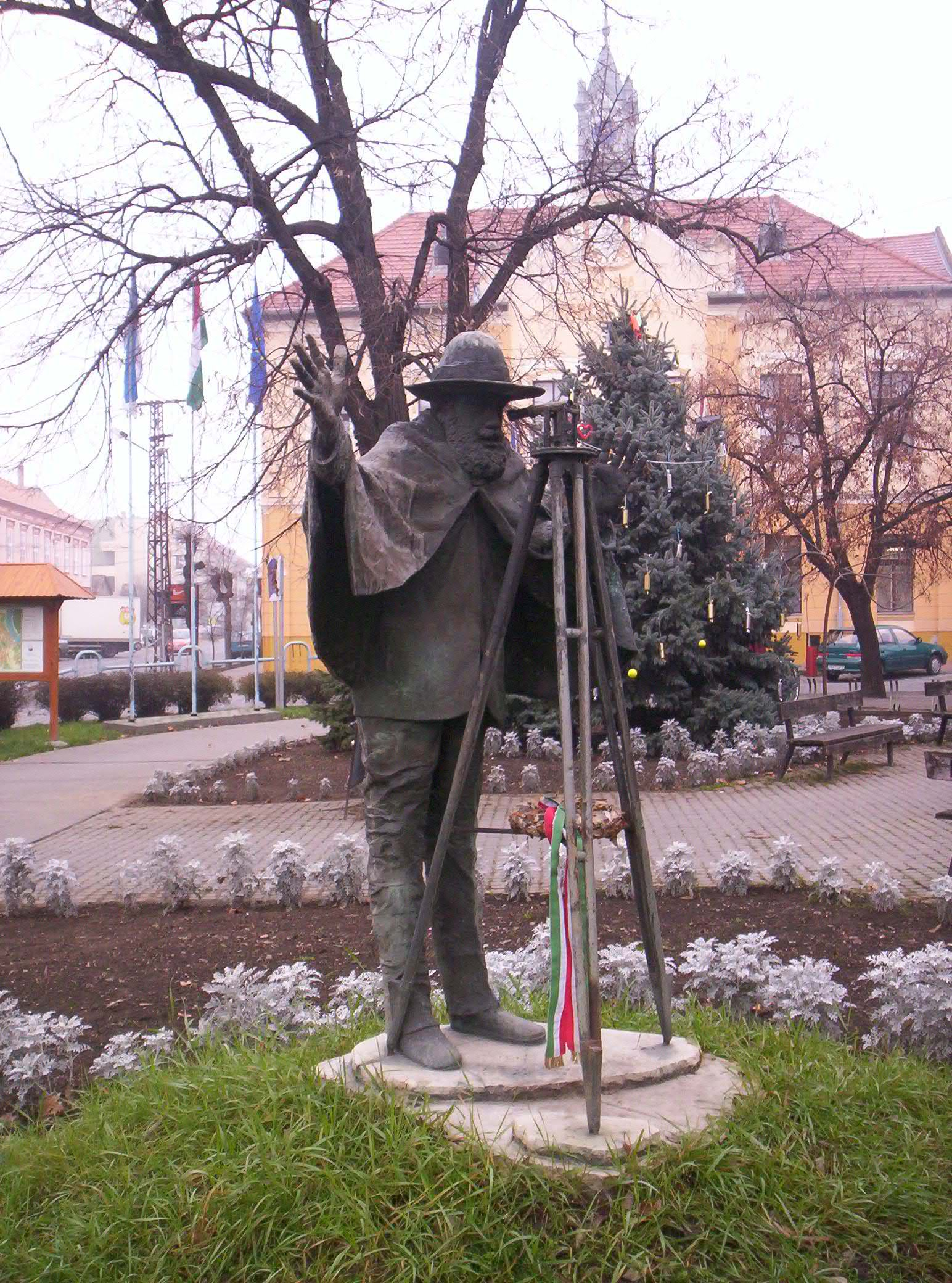 Beszédes József vízépítő mérnök szobra (Kligl Sándor, 1991) - Tolna megye, Dunaföldvár, Kossuth Lajos utca